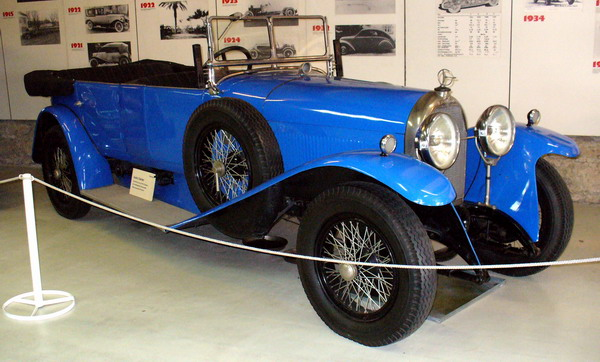 Schloss Langenburg Museum: Austro-Daimler-ADM-1923 2,6 l, 50 PS, 6 Cylinder, Konstruktion:Porsche : at 16 Oct 2006 in Langenburg